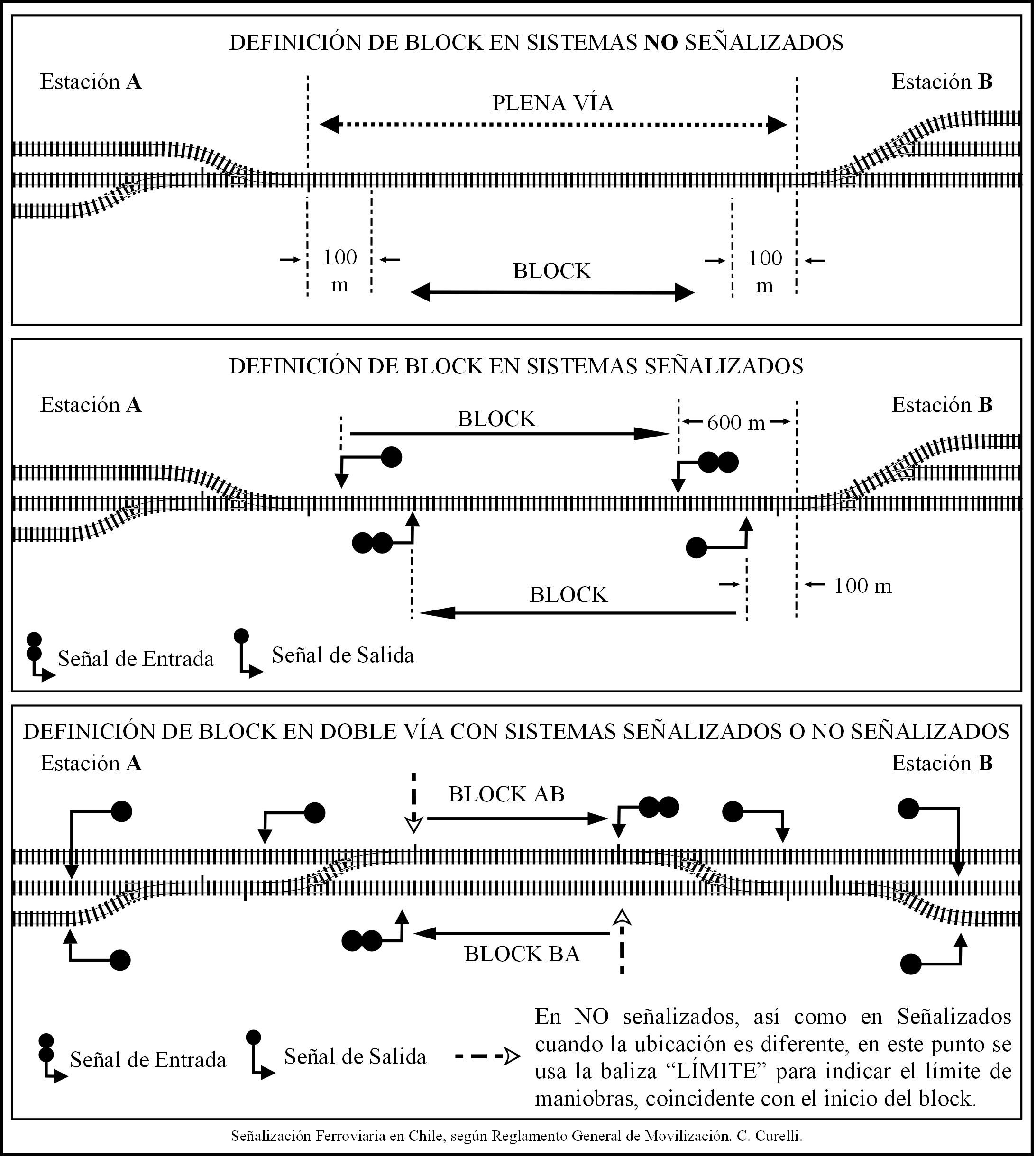 Definiciones de block en diferentes sistremas de movilización, según el Reglamento General de Movilización de los Ferrocarriles del Estado de Chile.